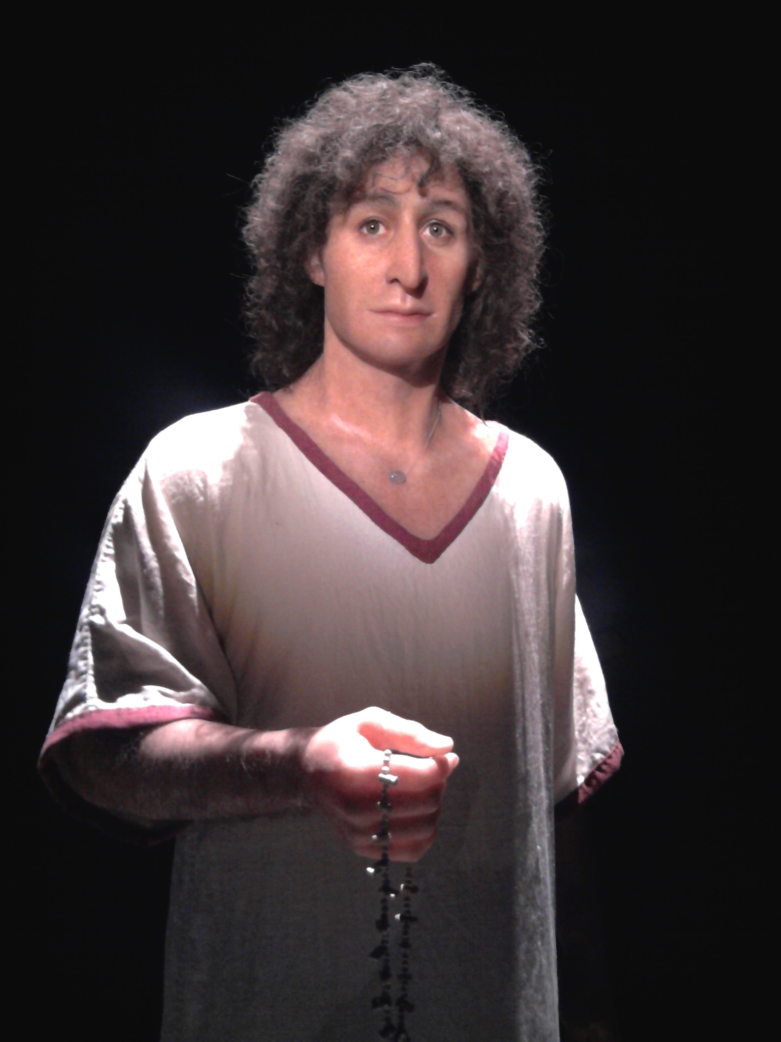 Tunisie, reconstitution du jeune de Byrsa retrouvé à Carthage